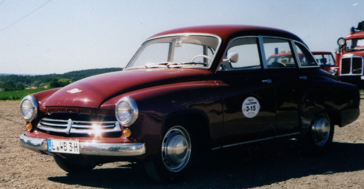 Wartburg 311/0 erste Ausführung 1956